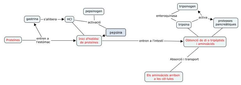 Esquema de la digestió de proteïnes